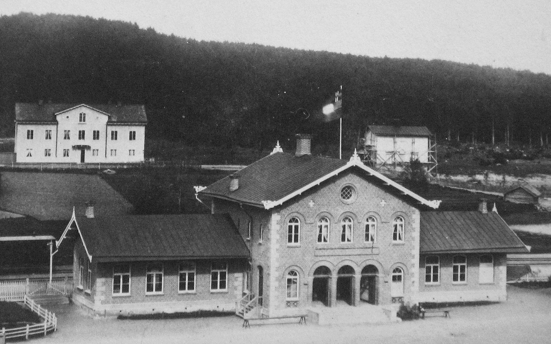 Fotografi av Johannes Jaeger, 1860 (eller tidigare, se [1]). Södertelge Södra station, ritades 1860 av Adolf Wilhelm Edelsvärd.